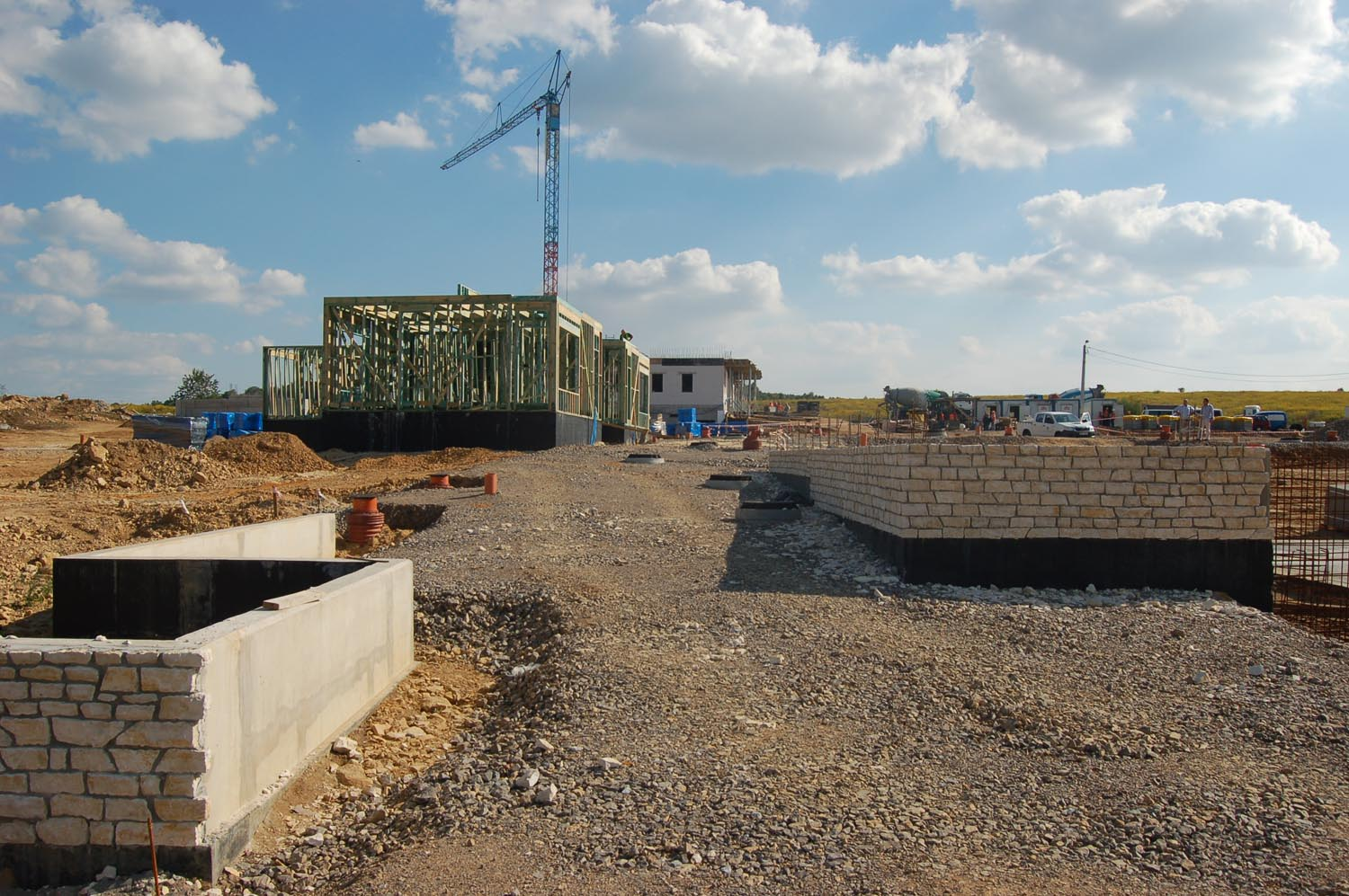 Zdjęcia z budowy pierwszego kwartału dzielnicy Siewierz-Jeziorna – pierwszego założenia urbanistycznego w Polsce realizowanego według zasad Nowej Urbanistyki. Wykonano już większość murów oporowych, widać zarys przejść pieszych i placyków. W budowie jest 8 jednostek jednorodzinnych oraz pierwsza kamienica z usługami w podcieniach.